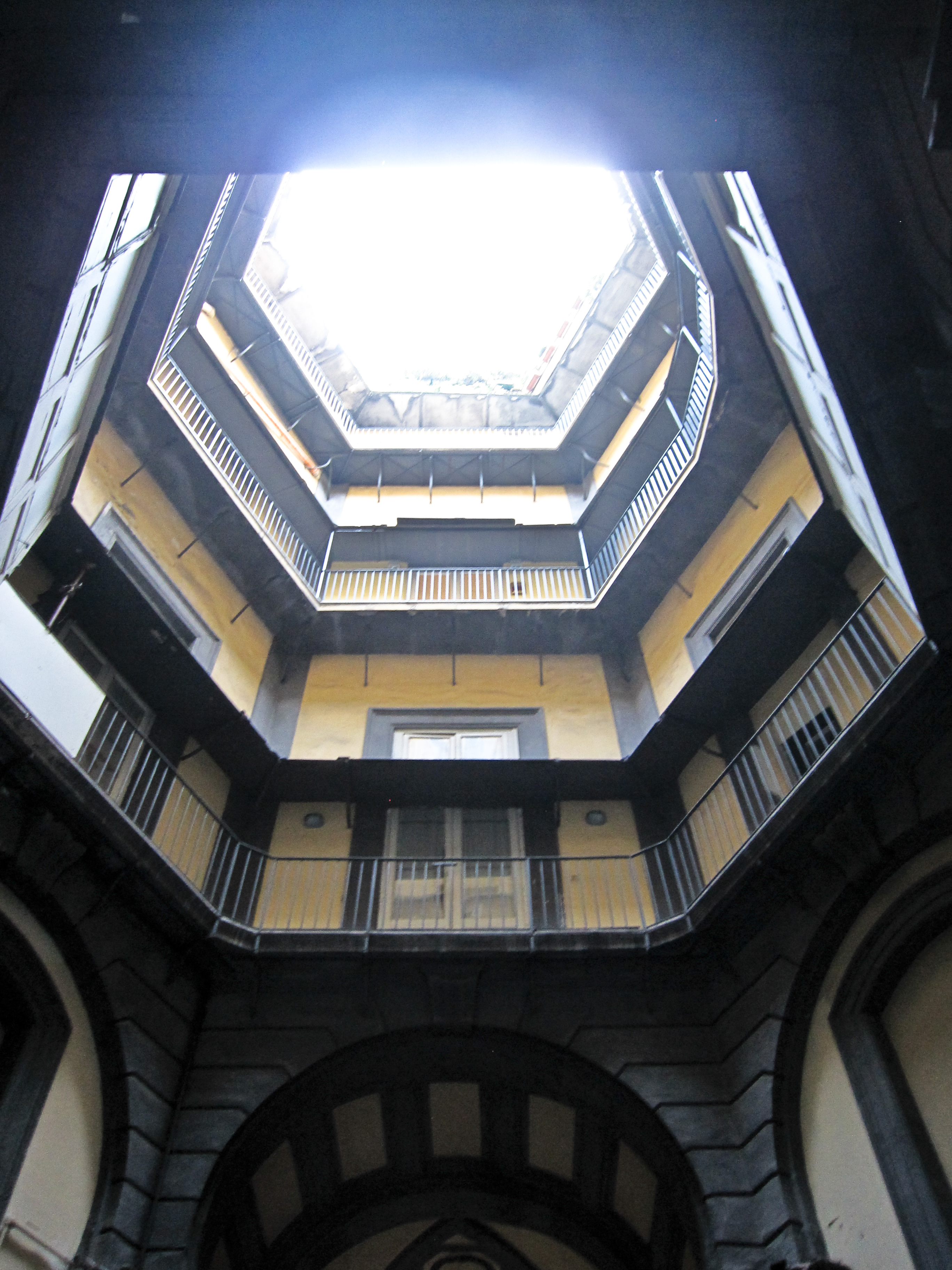 Napoli - Palazzo Doria d'Angri